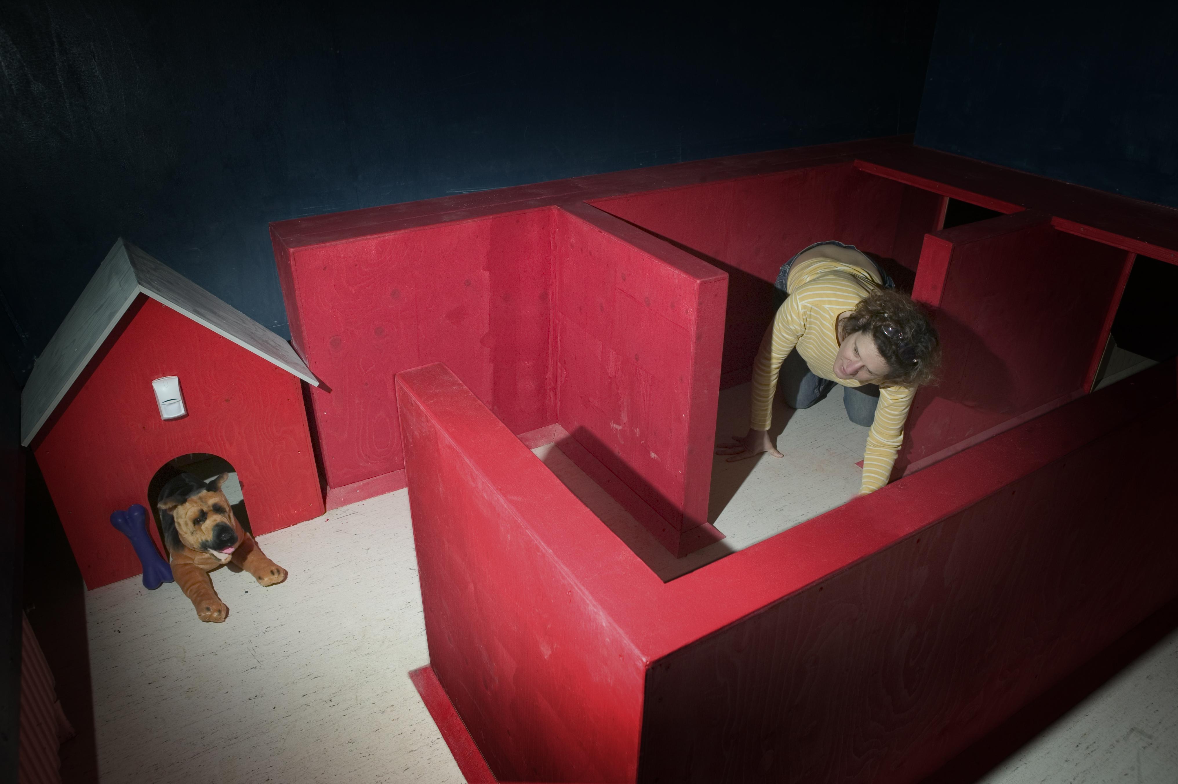 Från Boda Borg Visby